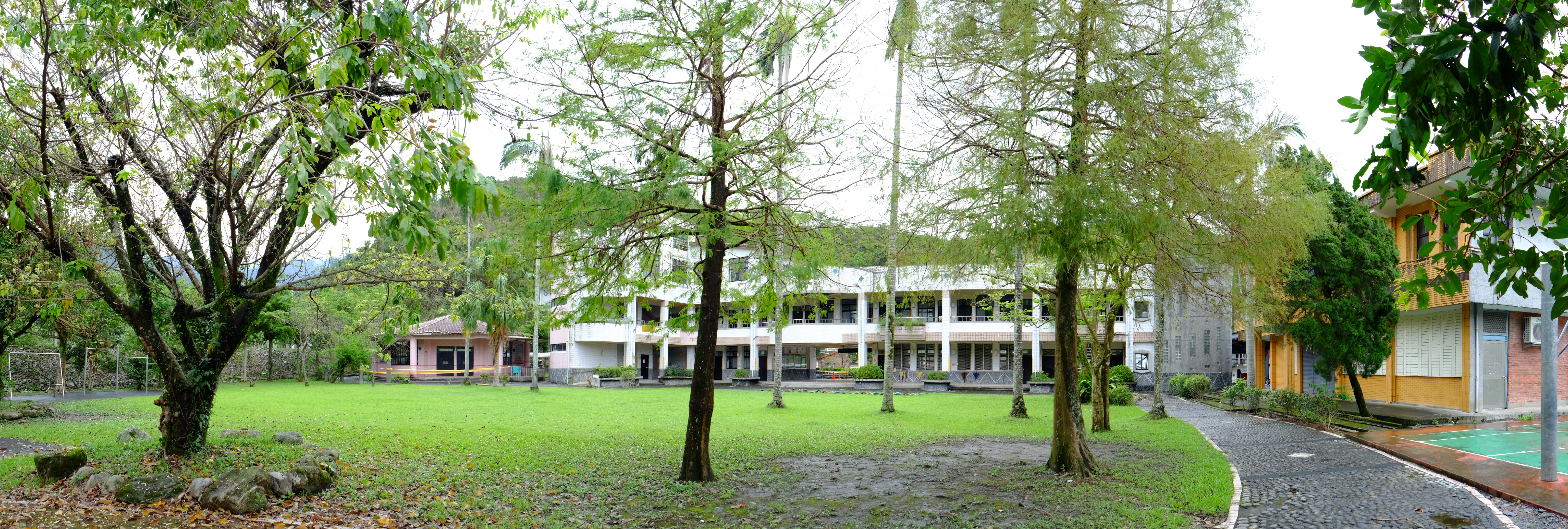 宜蘭縣大同鄉大同國民小學松羅分校。